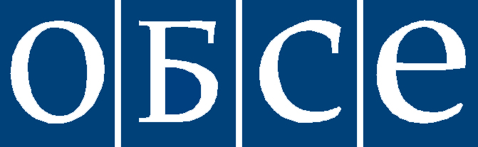 Русский логотип ОБСЕ